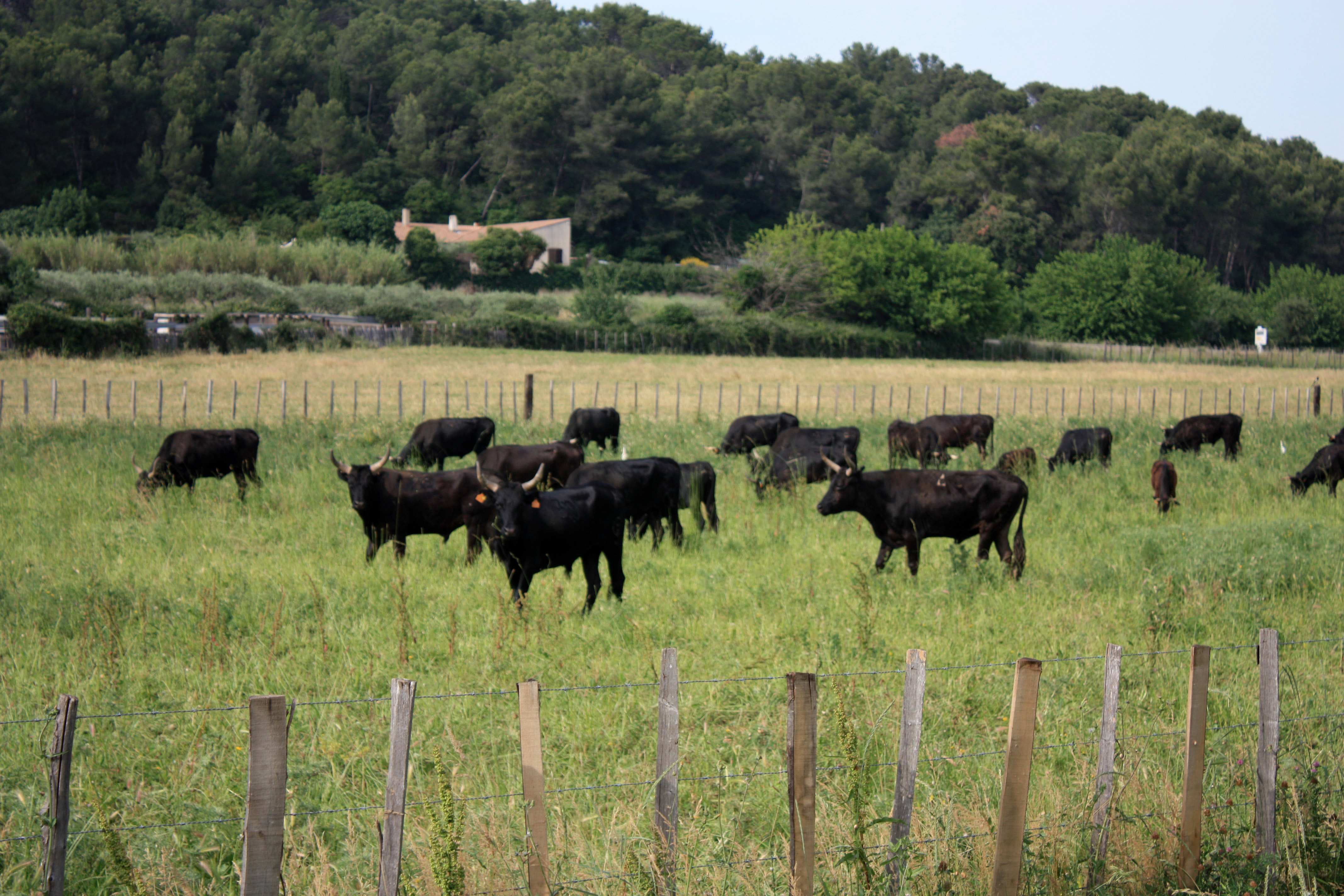 Juste retour des choses, sur la «voie verte», les marcheurs sont le spectacle de la manade de Congénies